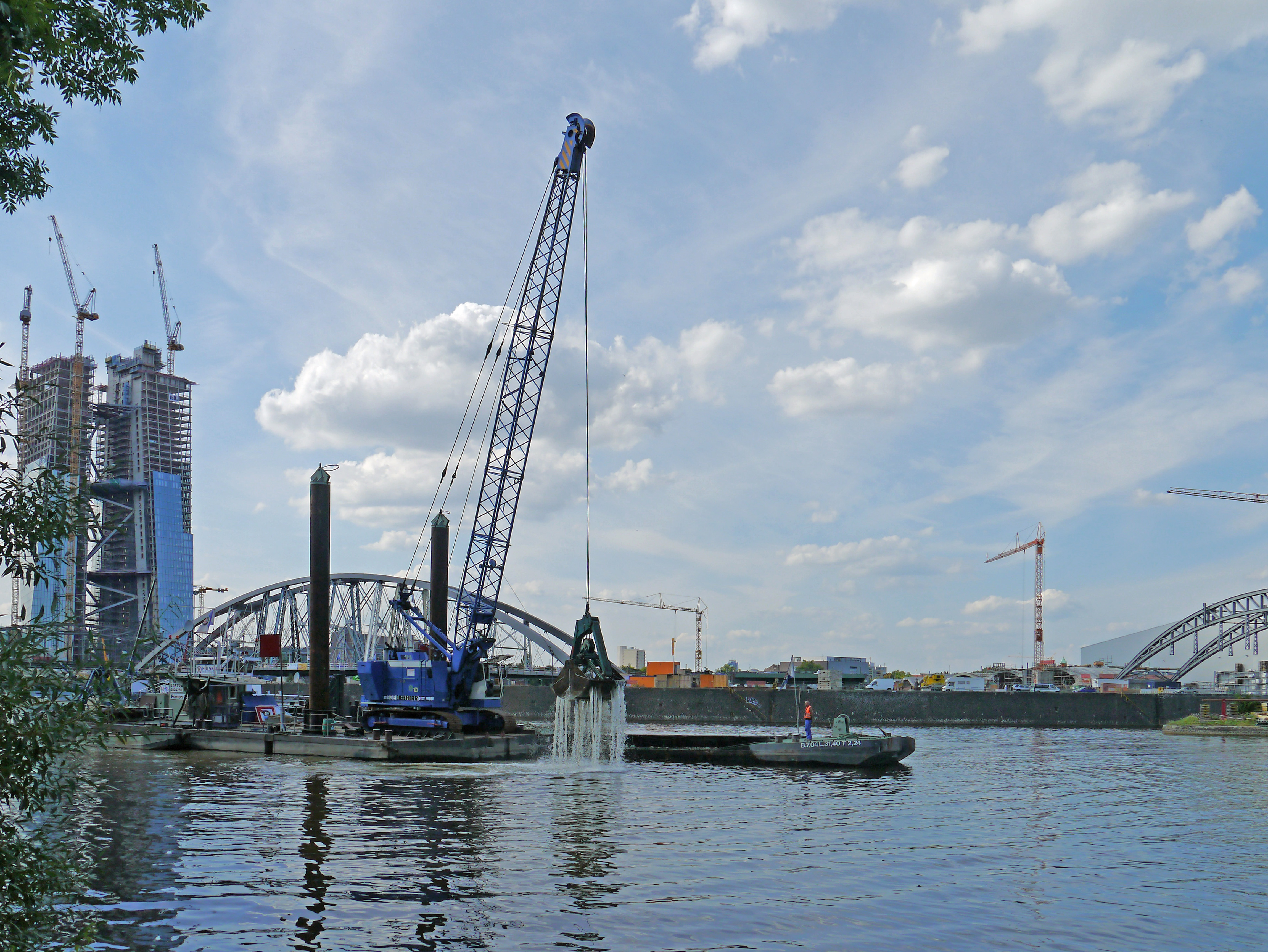 Baggerarbeiten (Fahrrinnenvertiefung) zur Vorbereitung des Einschwimmens am 22. August der Osthafenbruecke (Mainbruecke Ost). 13. August 2012 am Main in Frankfurt.